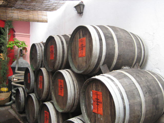 Barriles Bodegas La Sangre de Ronda